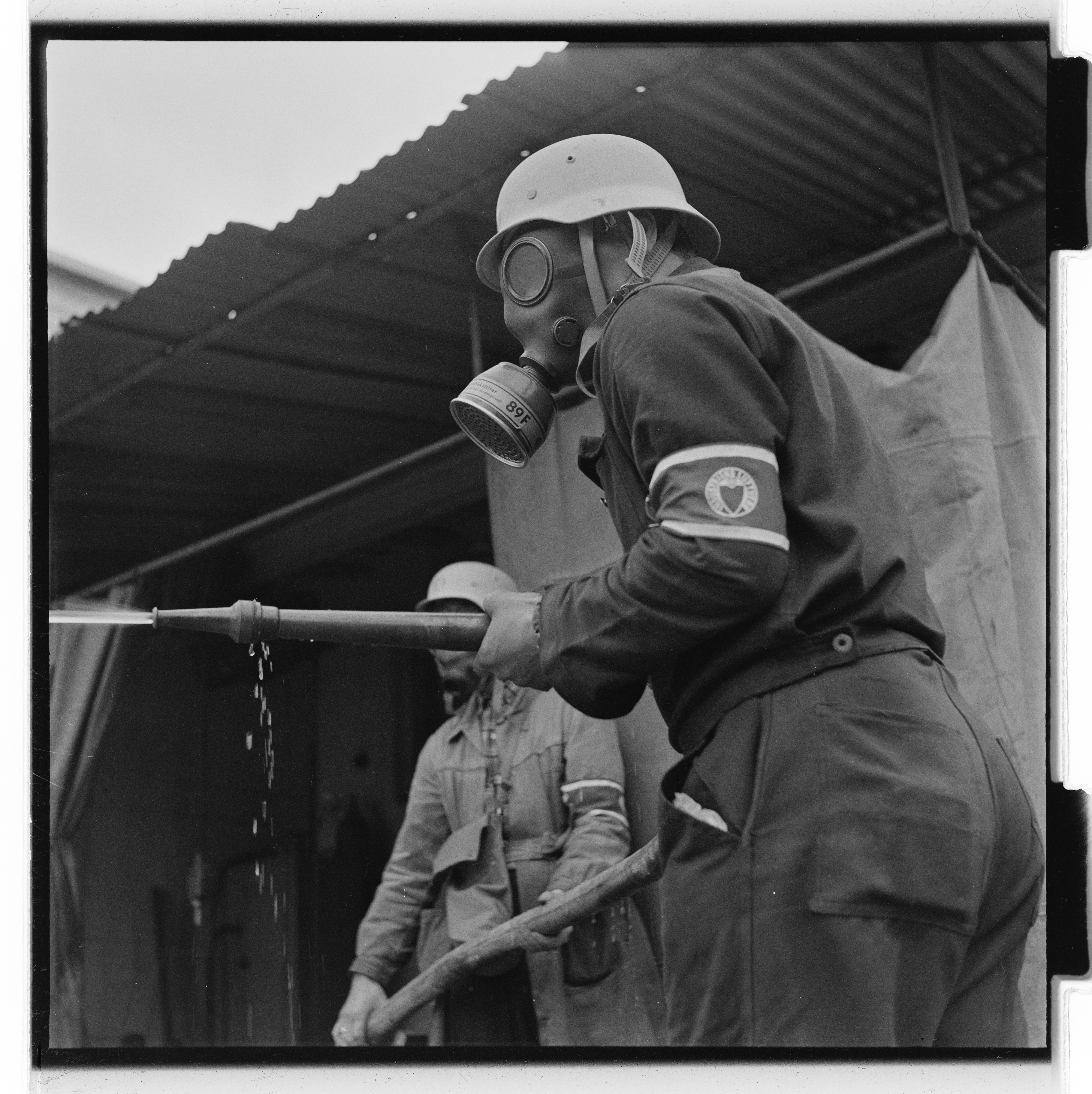 Bildet er hentet fra Arkivverket. Brannvern, industri-. NÅ nr. 13, 1953. Arkivinstitusjon : Riksarkivet Arkivnavn : Billedbladet NÅ Sted : Norge, Ukjent, Ukjent, Emneord: Brannvern, HMS, Øvelser Avbildet: Ukjent